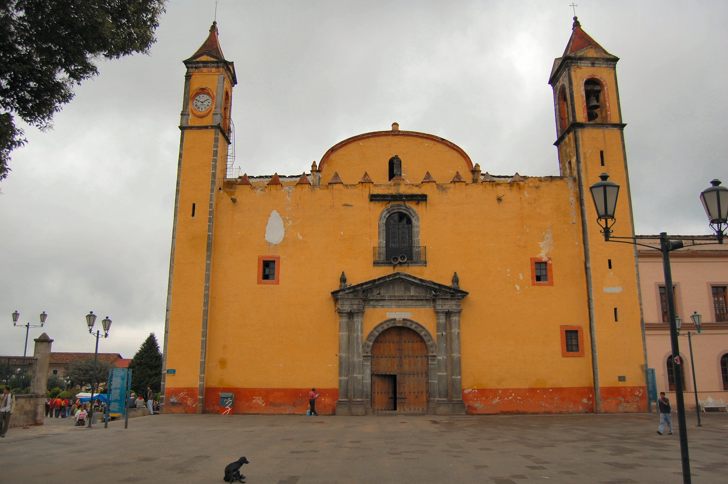 Exconvento franciscano de Zacatlán, Puebla, México.